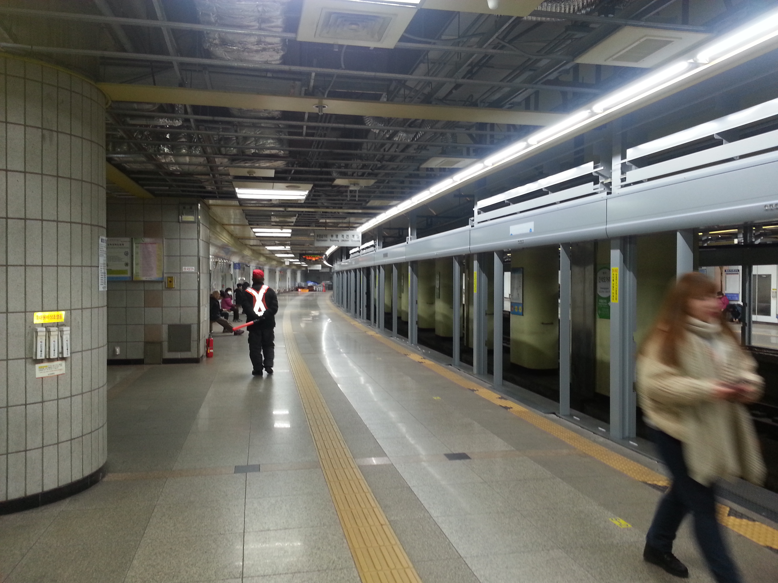 間石五ゴリ駅プラットホーム(2014年1月現在)